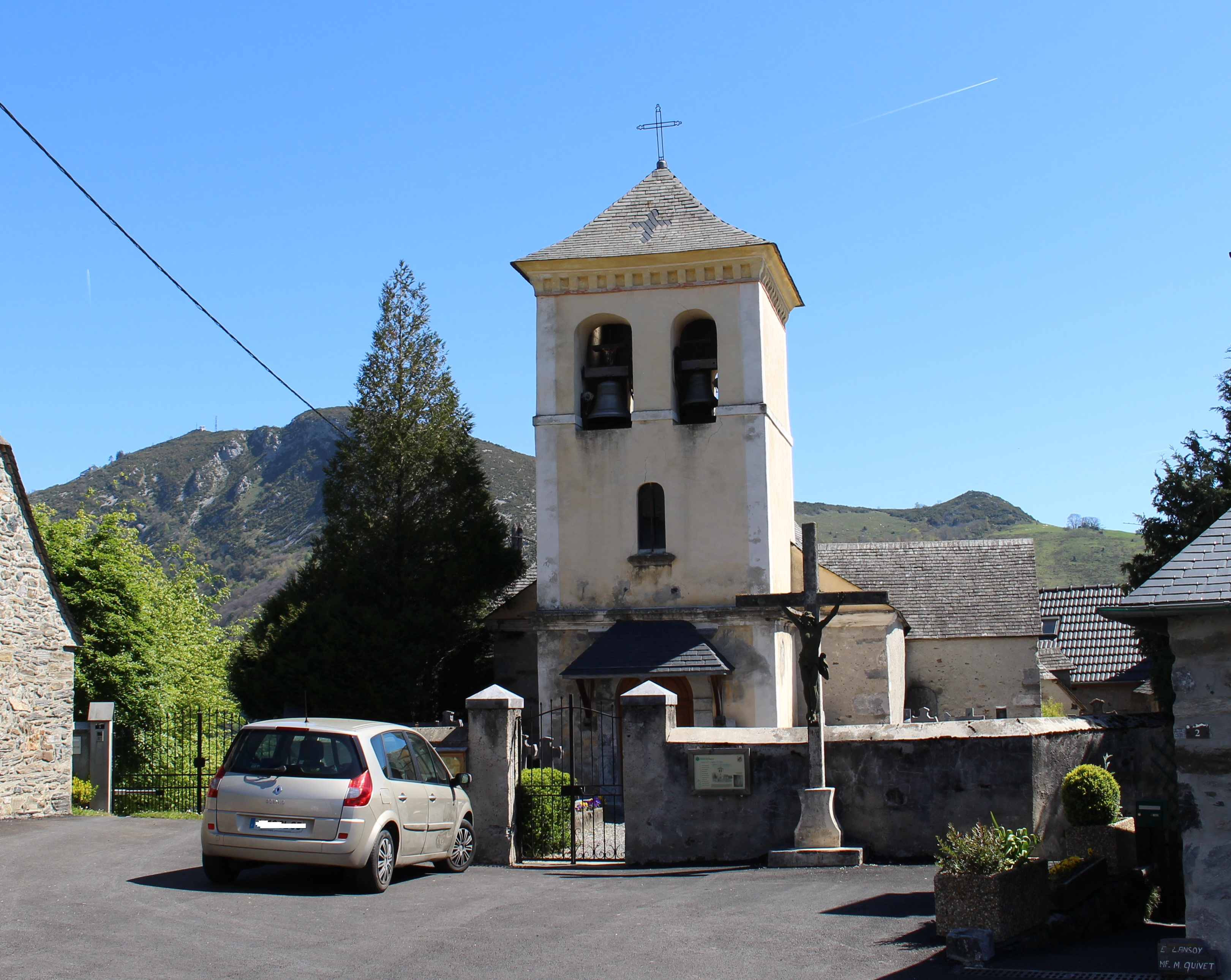 Église Saint-Martin de Viger (Hautes-Pyrénées)